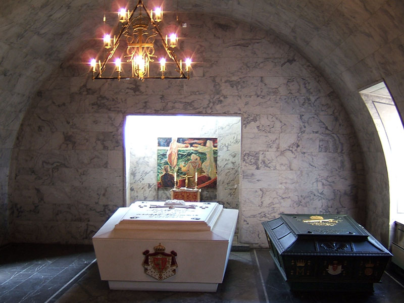 Bilde fra Det kongelige mausoleum i Akershus slott i Oslo. I den hvite sarkofagen hviler kong Haakon VII og hans hustru dronning Maud. I den grønne sarkofagen hviler kong Olav V og hans hustru kronprinsesse Märtha